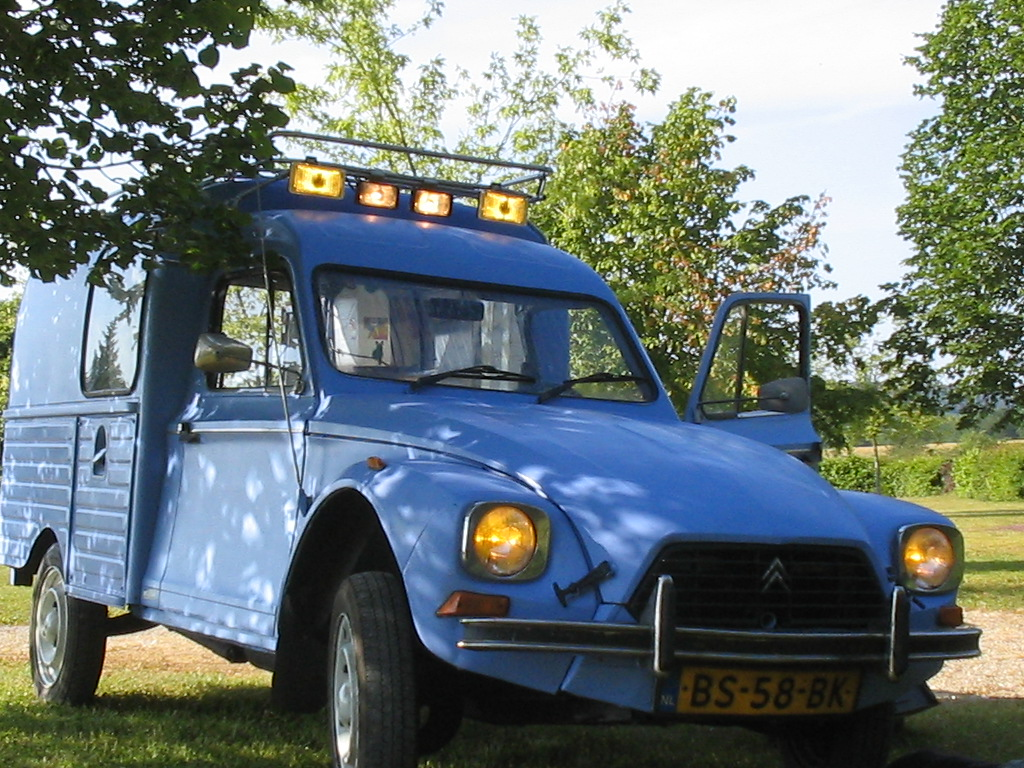 Acadiane 1986, France, june 2005